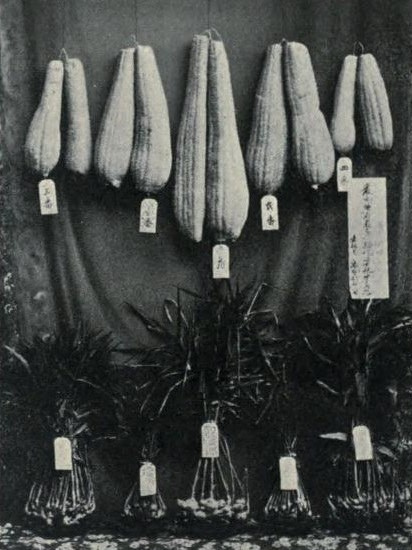 織田利三郎のヘチマと遠州しょうが